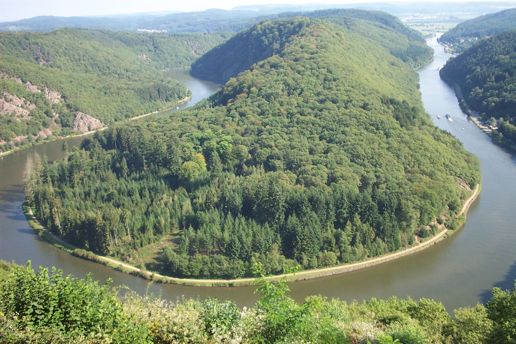 Die Saarschleife bei Mettlach, Ortsteil Orscholz (Aussichtspunkt Cloef)